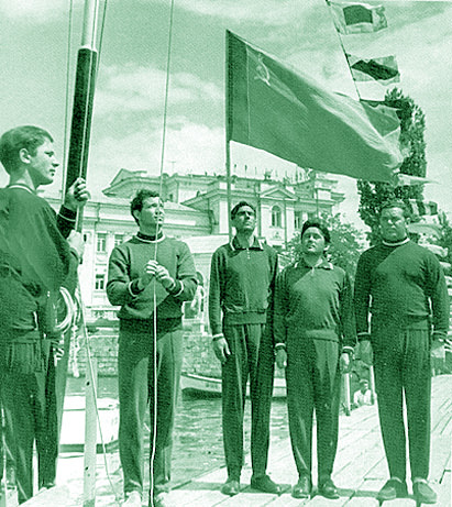 А. Шелковников, Валентин Манкин, Юрий Шаврин, Тимир Пинегин, Константин Александров